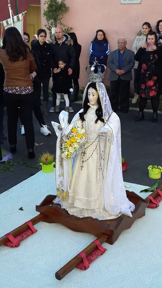 Simulacro della Vergine dopo il cambio d'abito durante il rito pasquale de "S'Incontru".